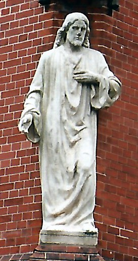 Die 1908 von Schwegerle erschaffene Christusfigur an der Außenfassade der St. Lorenz-Kirche.